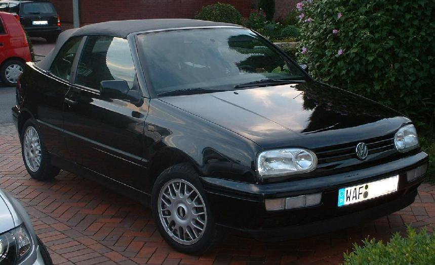 Dies ist mein Fahrzeug. Golf III Cabrio, 90PS, Baujahr 1995 A.Höchst